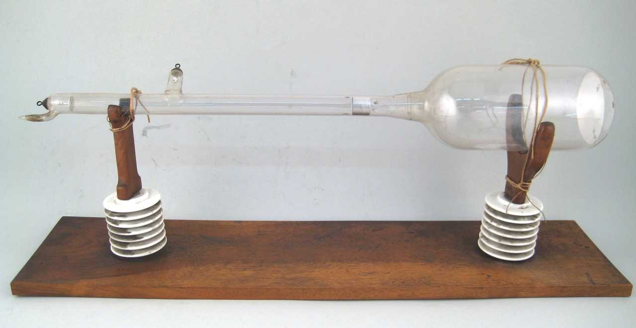 L'oggetto è costituito da un'ampolla in vetro di forma all'incirca cilindrica con una delle estremità che si restringe fino a formare un tubo, sempre cilindrico, di diametro minore del precedente ma di lunghezza maggiore. All'estremità di questo è collocato un elettrodo metallico, dalla parte opposta invece si trova uno schermo fluorescente. Un secondo piccolo tubicino in vetro, anch'esso di forma cilindrica, è collocato perpendicolarmente e contiene un elettrodo. Gli elettrodi venivano utilizzati per generare una scarica elettrica all'interno del tubo stesso. Sullo schermo fluorescente era possibile visualizzare l'arrivo delle particelle cariche così accelerate (elettroni) Lo strumento è posizionato orizzontalmente ed è supportato da due forcelle in legno che tramite due isolatori in ceramica bianca poggiano su una base in legno rettangolare. Funzione Oggetto prevalentemente di uso didattico e dimostrativo che permette di mostrare il fenomeno della emissione di particelle cariche.